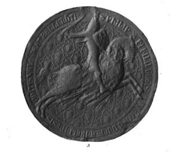 Philip, Duke of Orléans